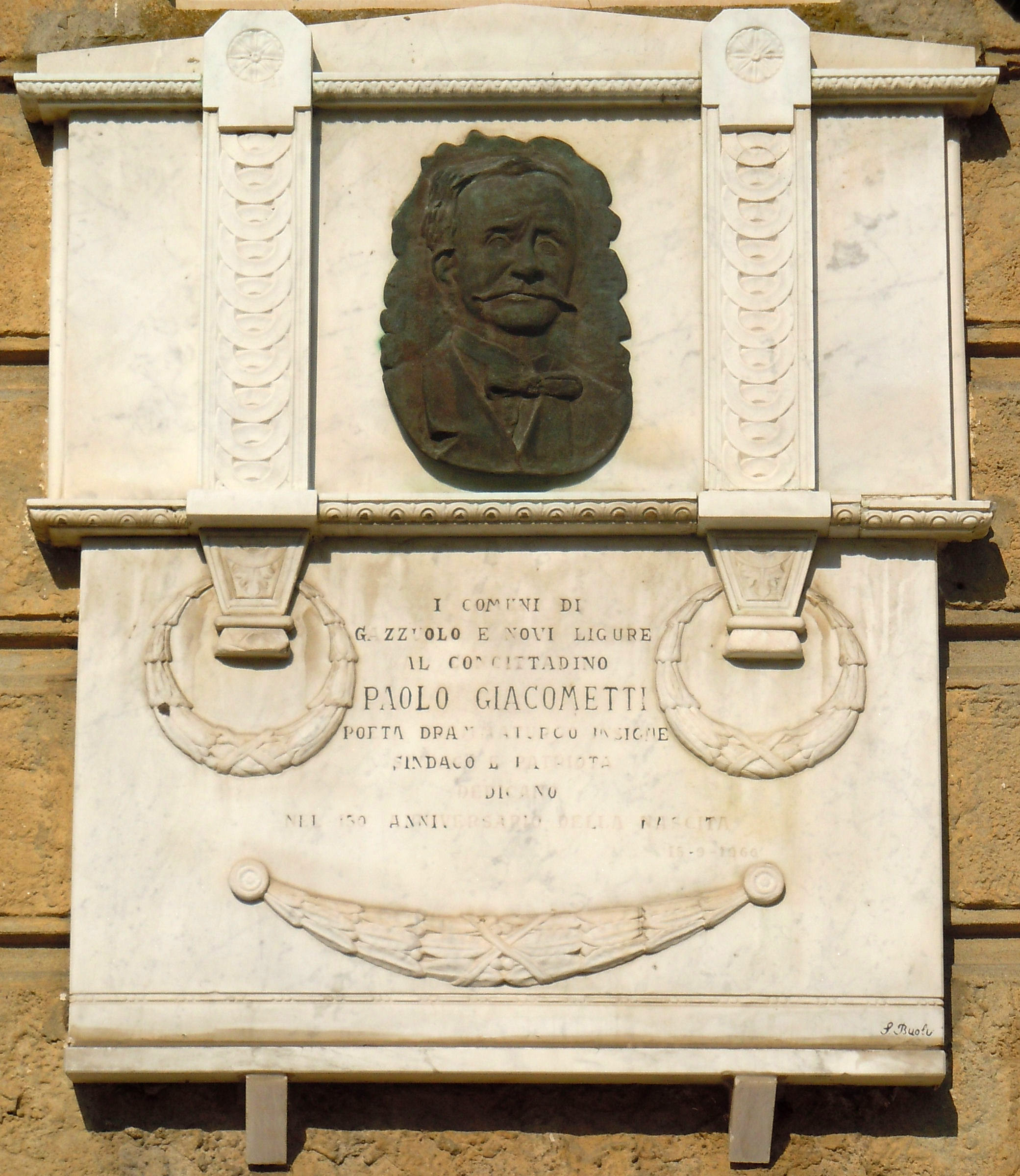 Gazzuolo, lapide a Giacomo Giacometti.